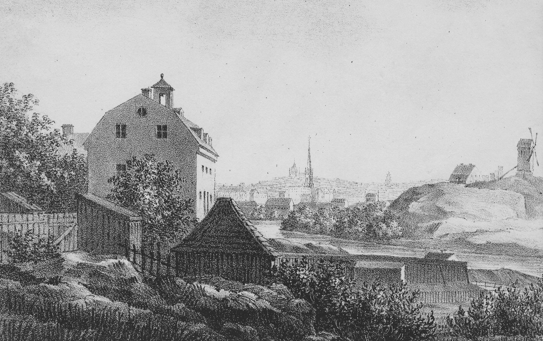 Äldra litografi visande Nicolaihuset på Sabbatsbergsområdet. Längst till höger syns Grubbens kvarn (revs 1892)